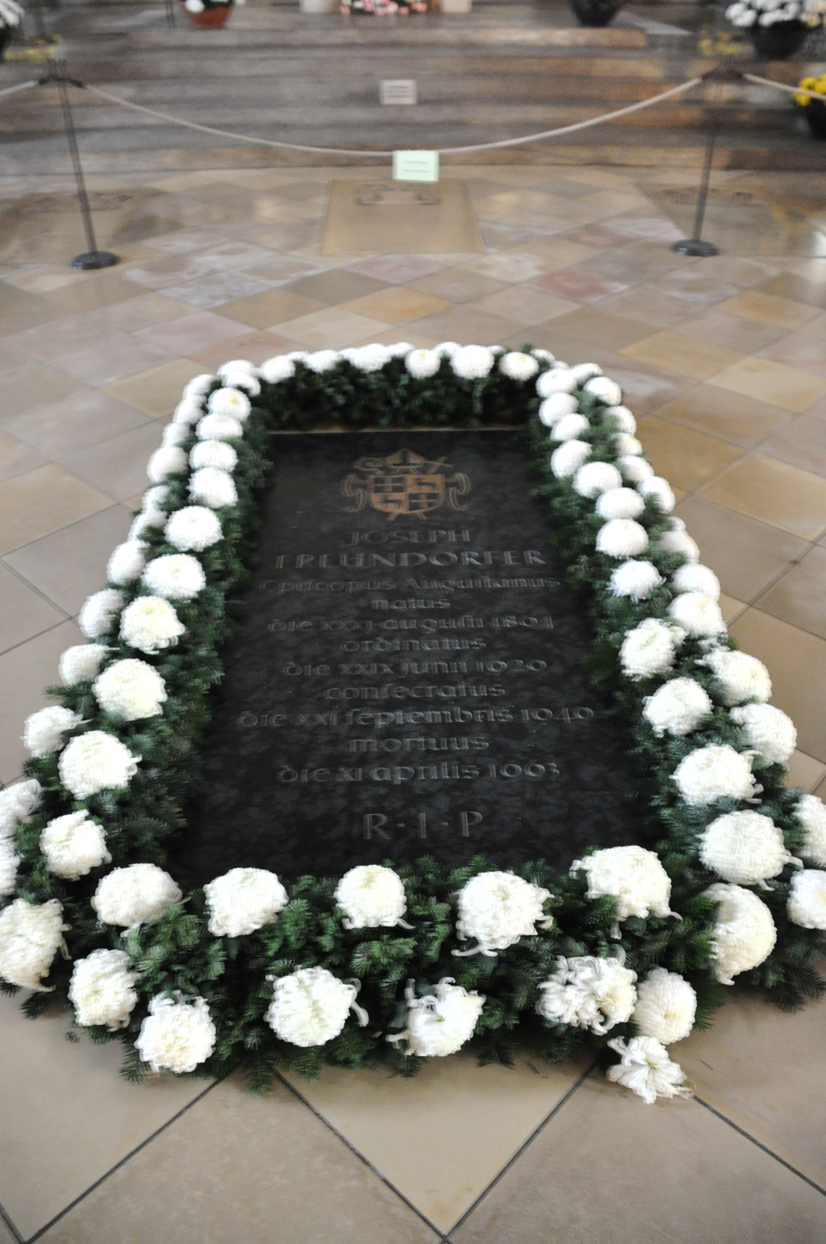 Augsburg, Dom, Grabplatte für Bischof Joseph Freundorfer (1894–1963)